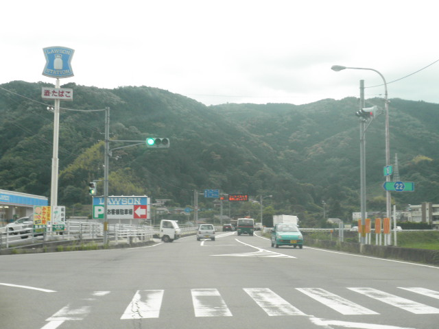 徳島県勝浦郡勝浦町沼江車ノ口 徳島県道16号徳島上那賀線